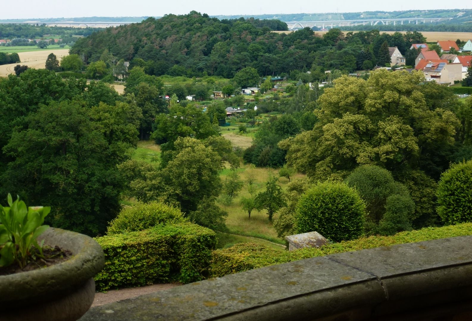 Blick vom Schloss Burgscheidungen auf die Unstruttalbrücke